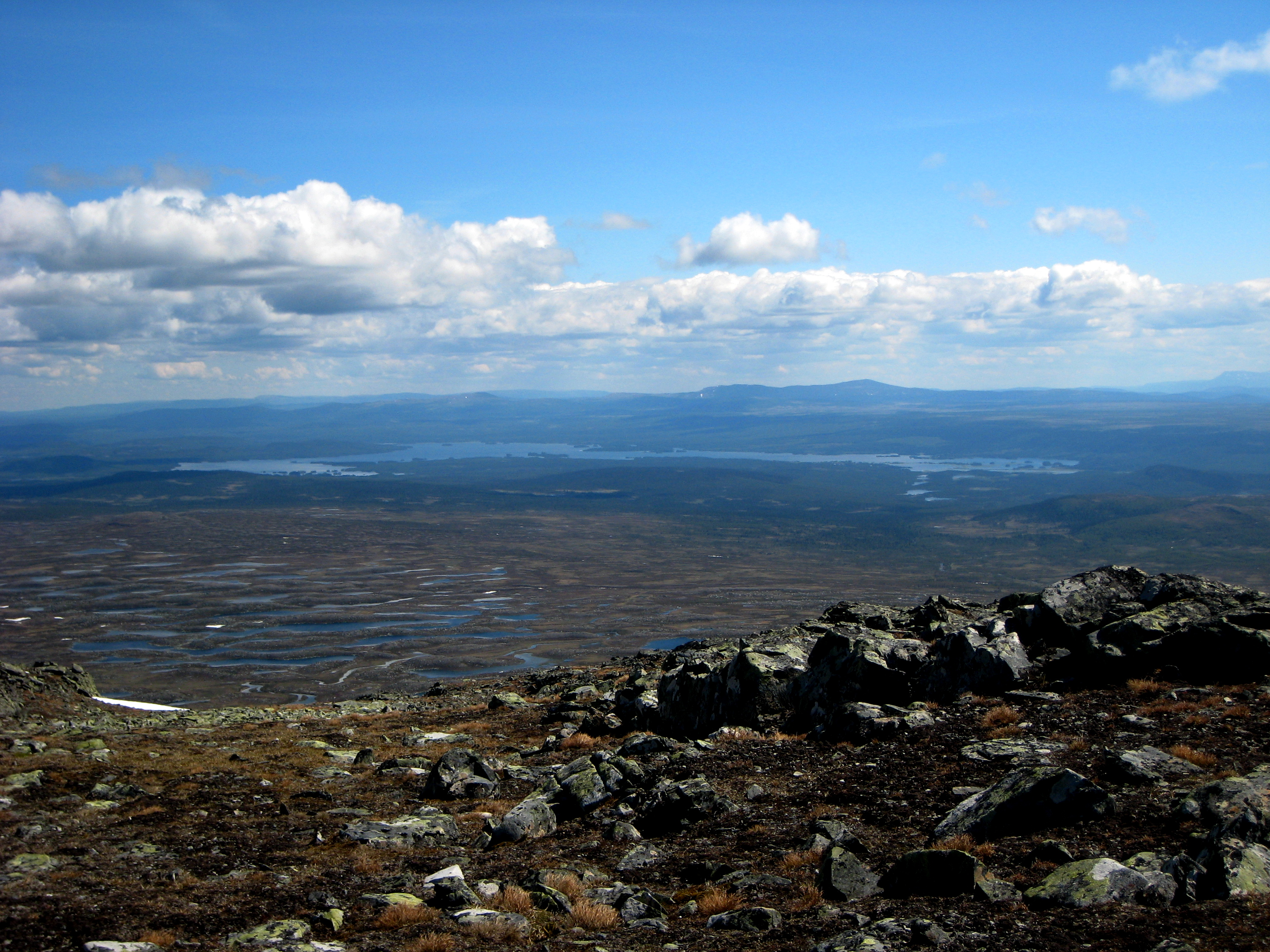 Stosjön i Härjedalen, sedd från toppen av Dunsjöberget